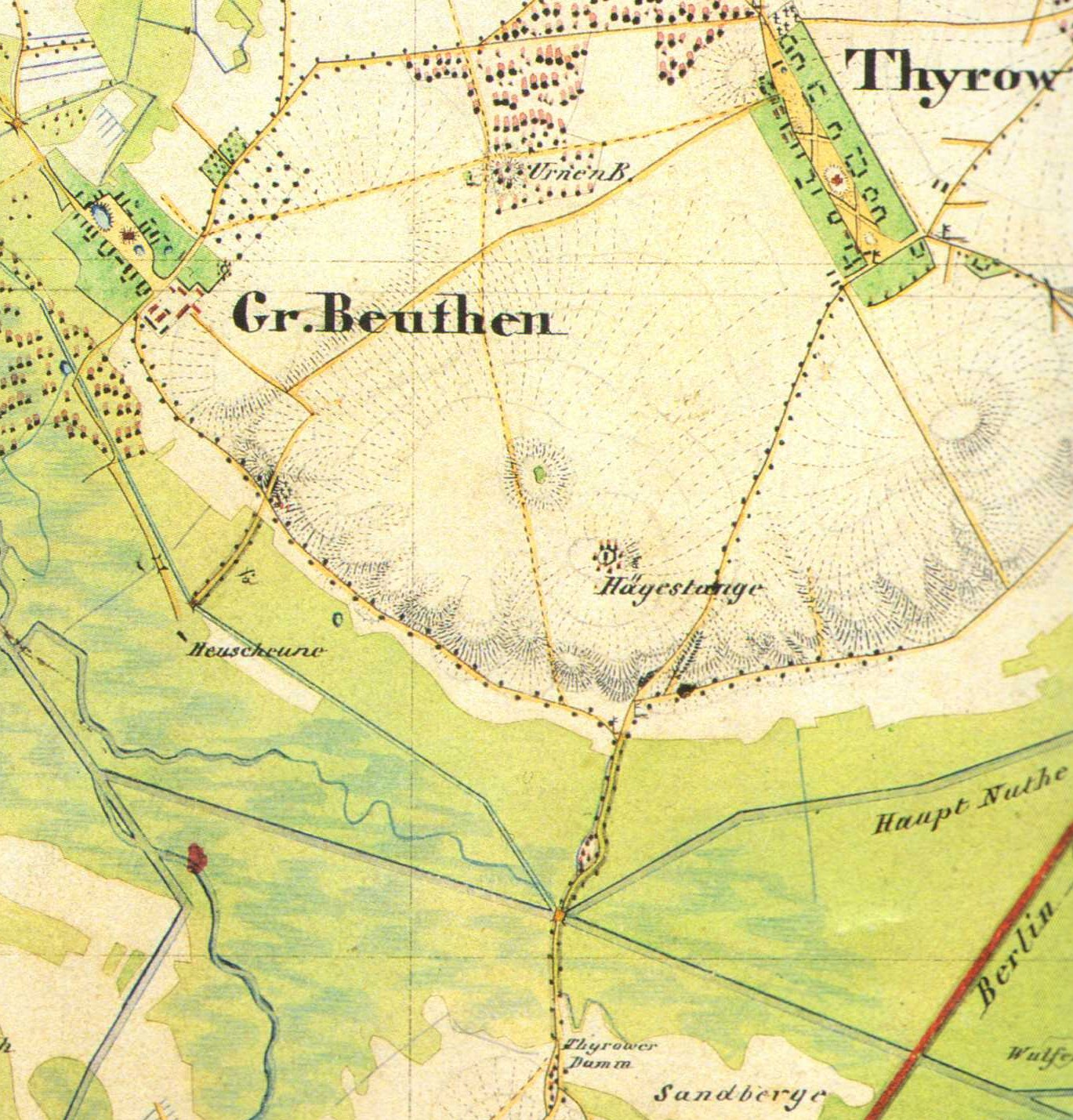 Der Thyrower Damm, zwischen Thyrow und Trebbin, auf dem Urmesstischblatt, 1:25000, Blatt Trebbin (Nr.3745) von 1840, Trebbin, Brandenburg, Deutschland